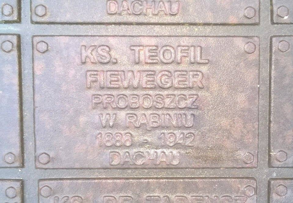 Tabliczka upamiętniająca ks. Teofila Fiewegera, stanowiąca element jednej z płyt pamiątkowych przy Pomniku Polskiego Państwa Podziemnego i Armii Krajowej w Poznaniu.